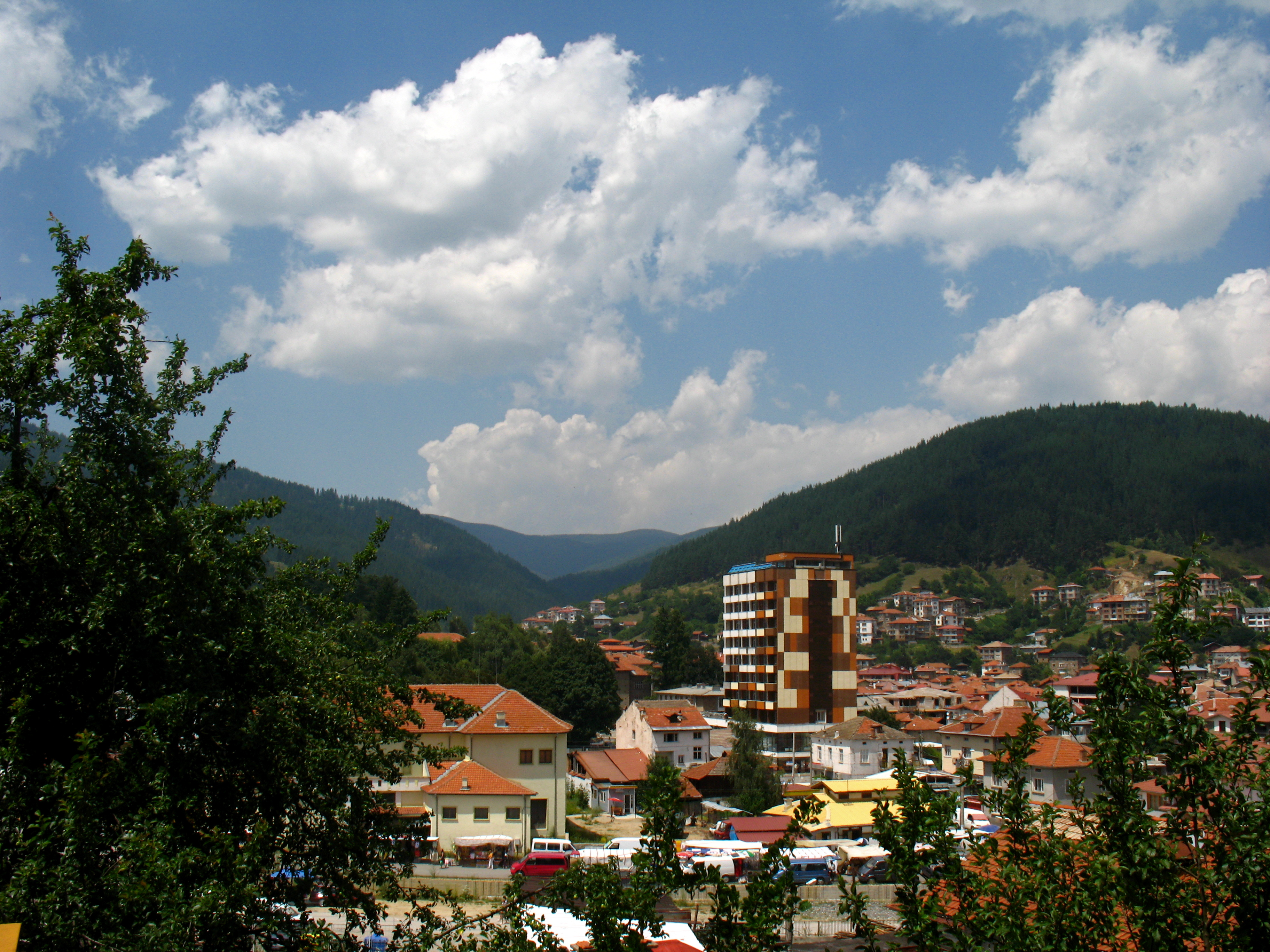 Чепеларе